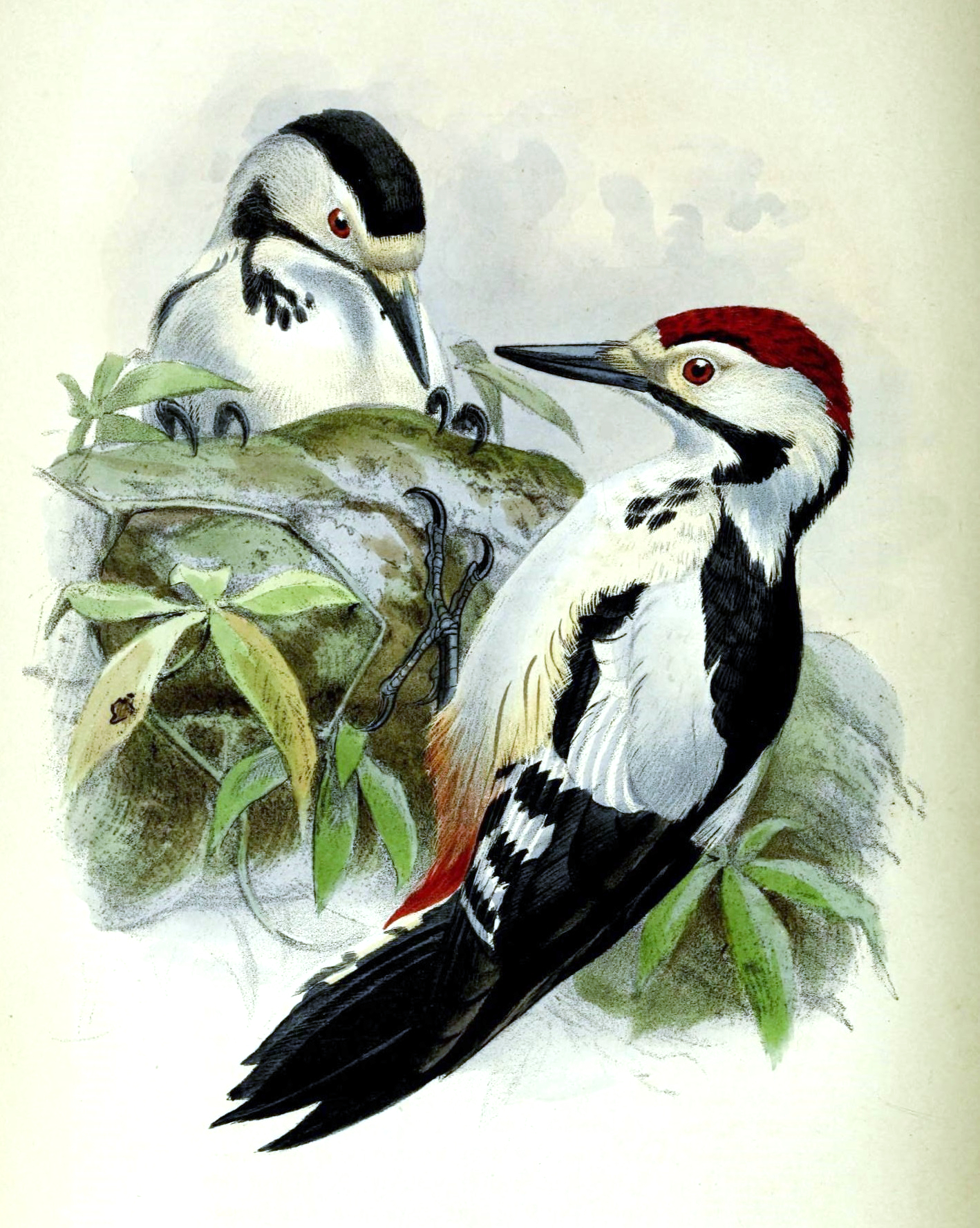 Dendrocopos assimilis, Blyth, 1849. Ilustración de John Gerrard Keulemans en Lahore to Yārkand : incidents of the route and natural history of the countries traversed by the expedition of 1870, de T. D. Forsyth.